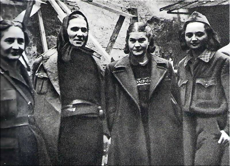 Srpskohrvatski / српскохрватски: Drugarice (s lijeva na desno) Mica Šlander, Kata Pejnović, predsjednica AFŽ-a, Maca Gržetić i Mitra Mitrović, vijećnici II zasjedanja AVNOJ-a